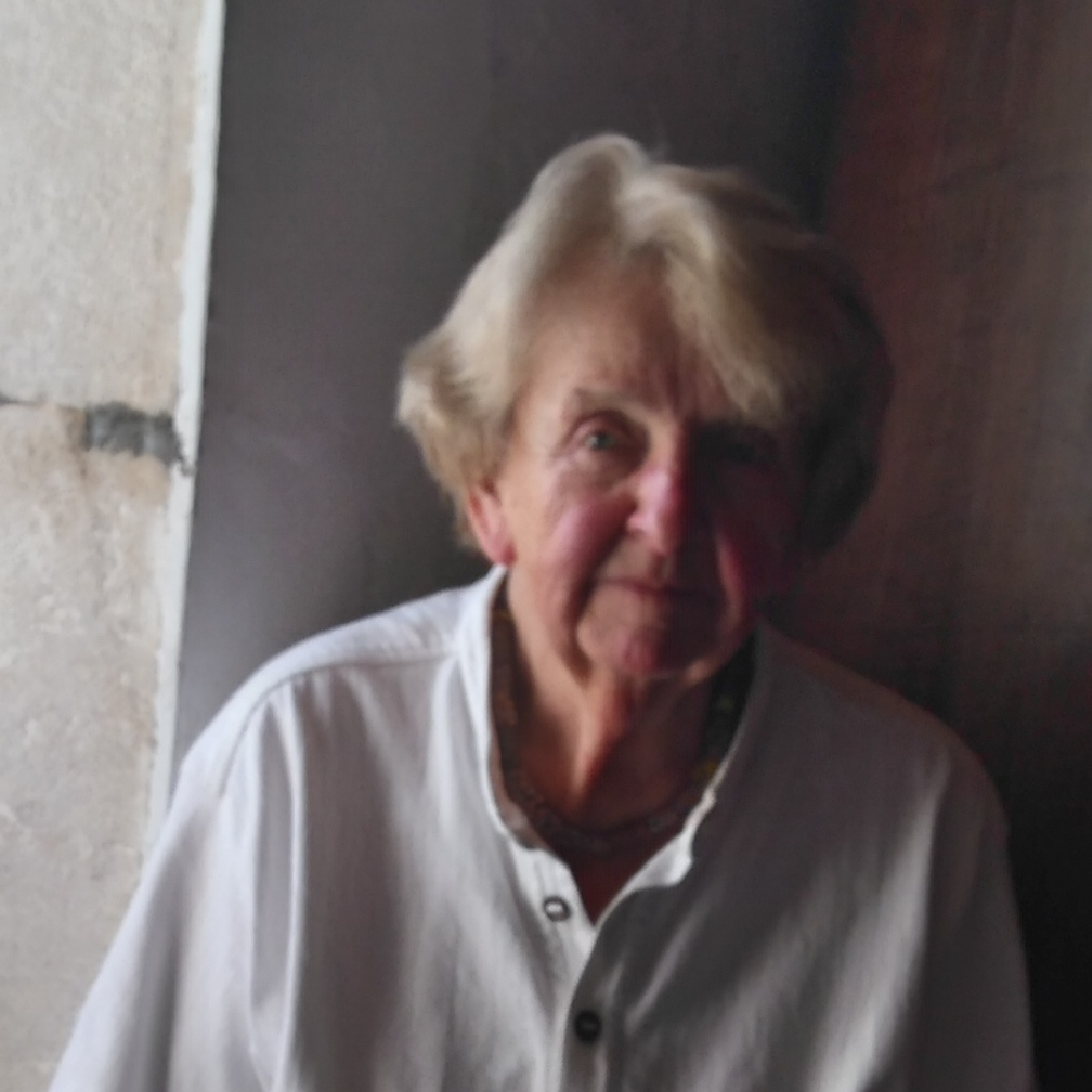 Portrait de C H Perrot en compagnie d'un témoignage de son passé familial